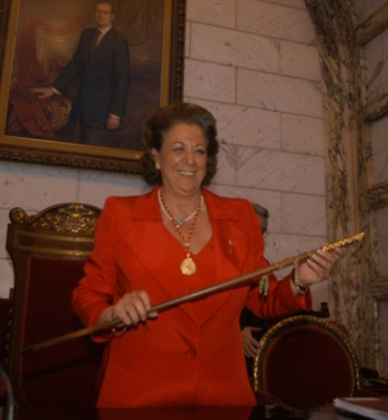 Rita Barbera